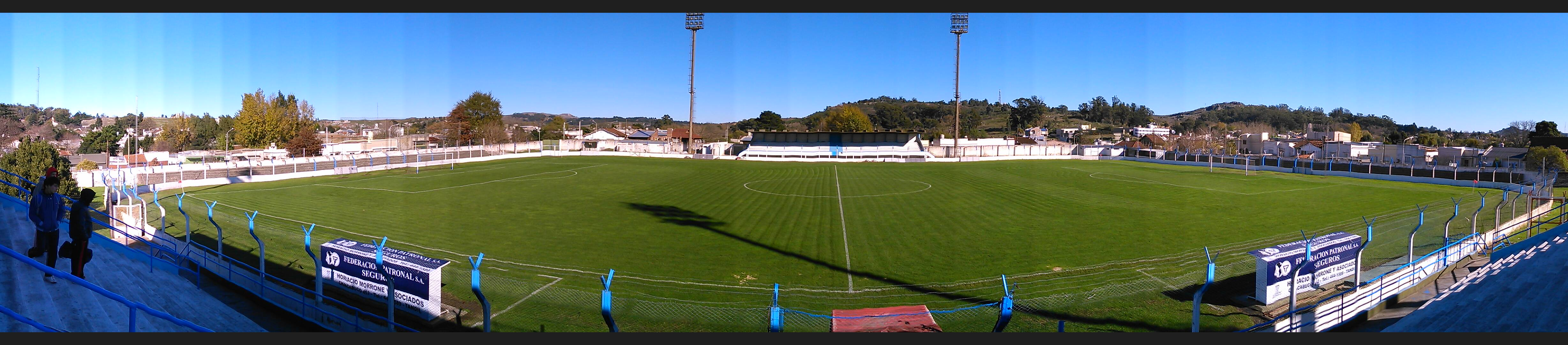 Estadio Tandil